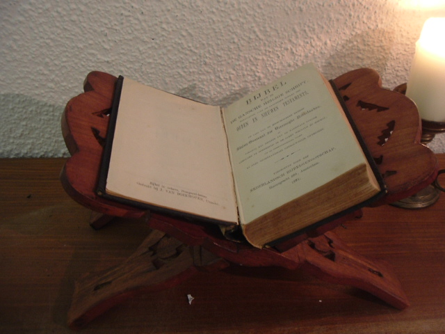 eigen foto, statenbijbel uit 1921